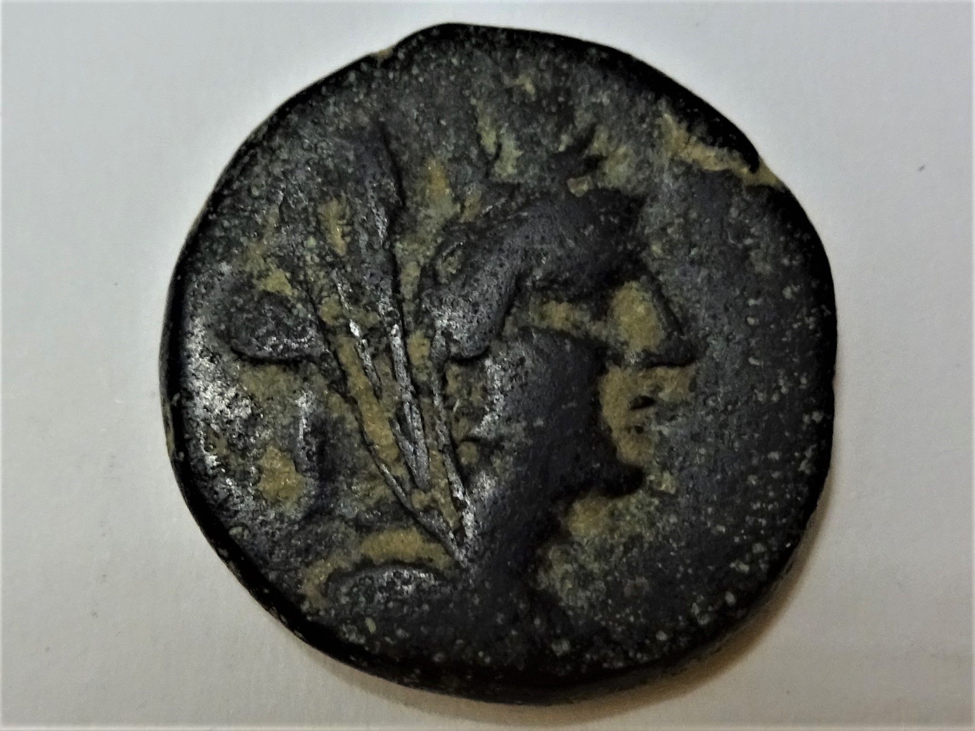 Bronzemünze aus Sardeis mit Kopf der Tyche mit Mauerkrone und Lorbeerkranz, Szaivert/Sear Nr. 5171